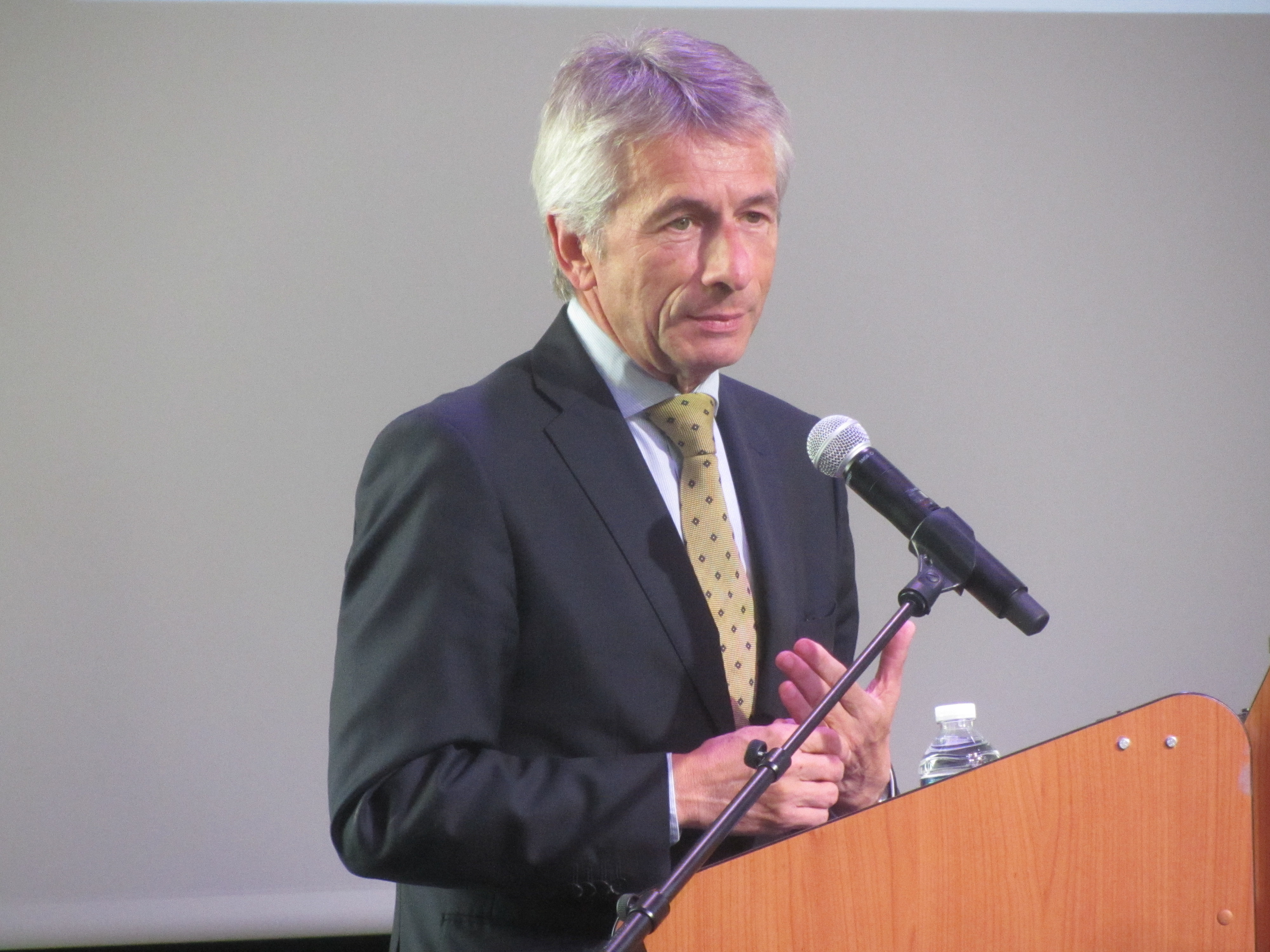 Laurent Beauvais, lors de la clôture des Assises nationales de la médiation numérique, à la MRI de Caen. This document was produced using the Canon PowerShot SX230 HS lent by Wikimedia France.